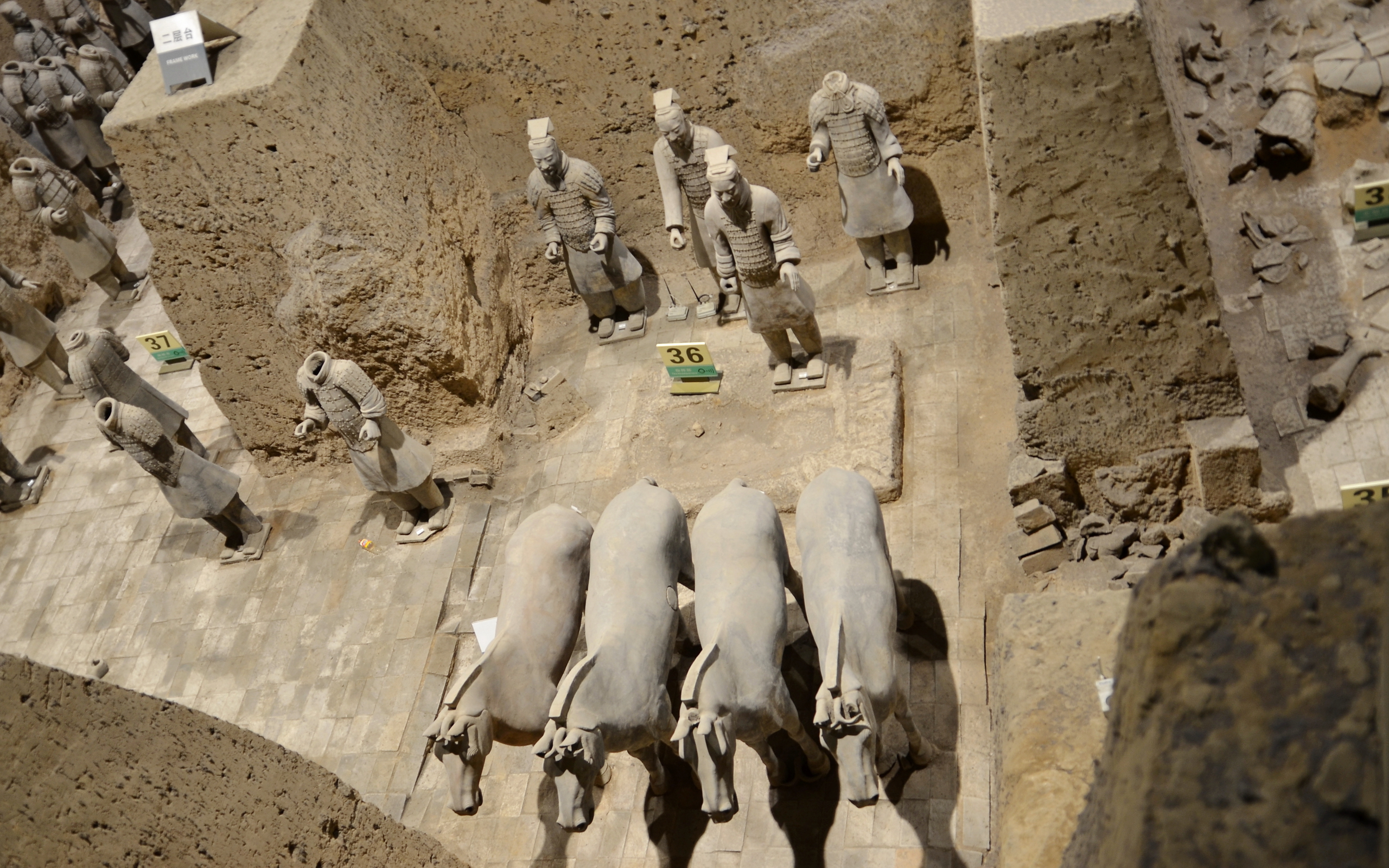 秦始皇陵兵马俑博物馆三号坑局部